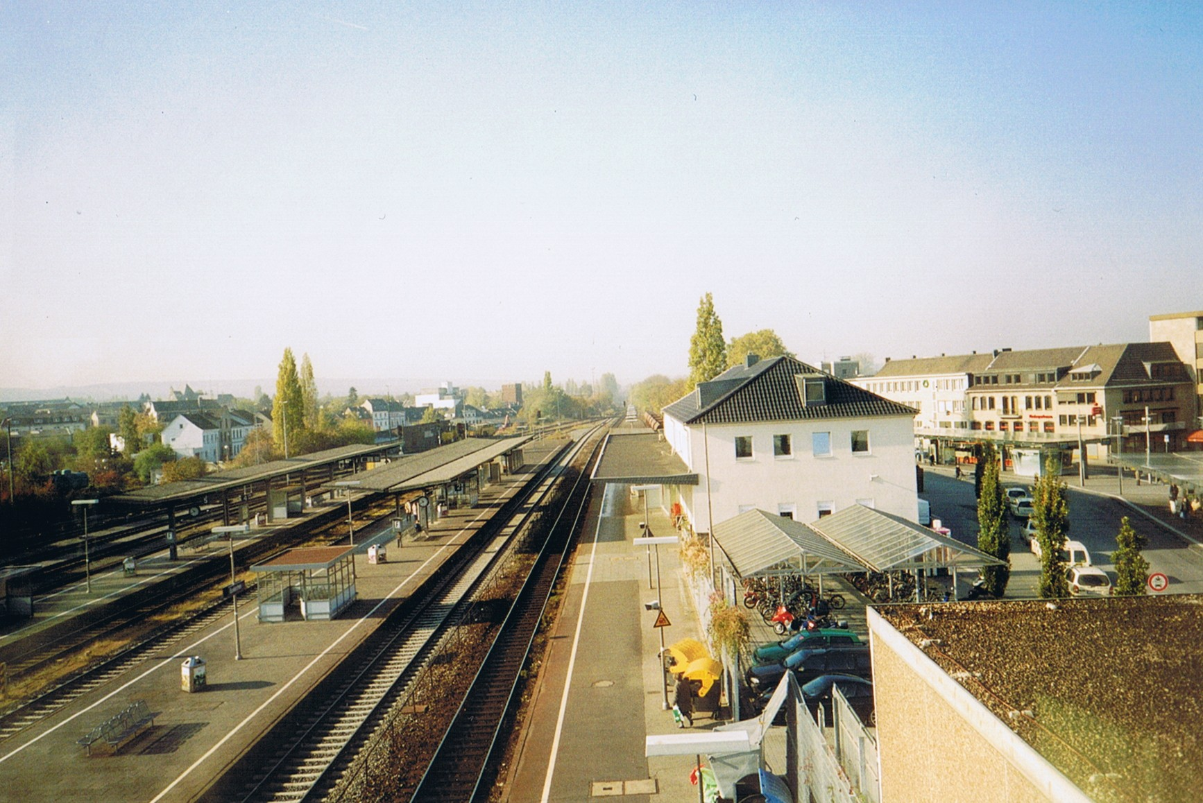 Sicht aus Stellwerk auf den Bahnhof Euskirchen